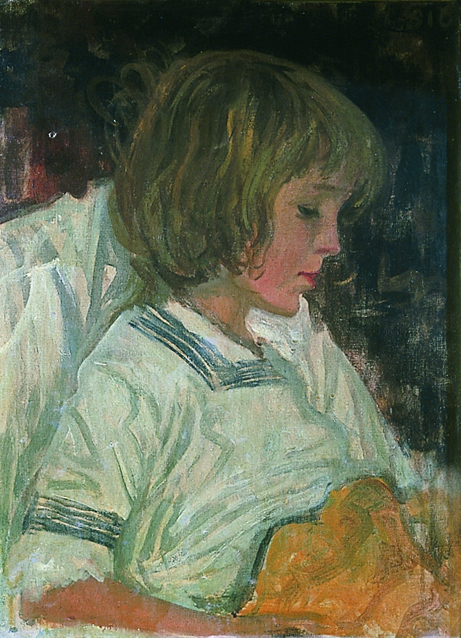 Körösfői-Kriesch Aladár: Tamás betegen